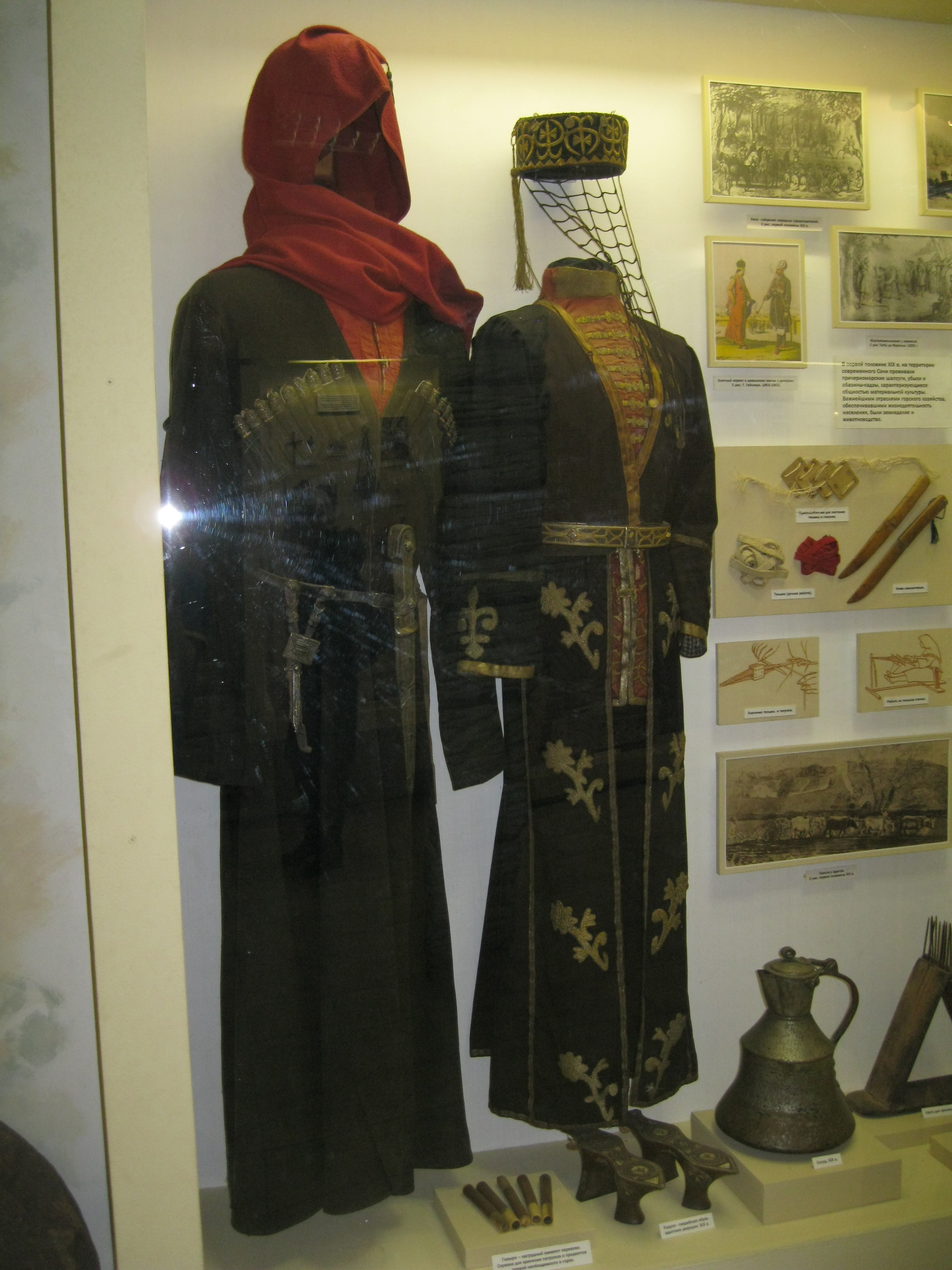 Национальный костюм адыгов. Музей истории города-курорта Сочи, Россия